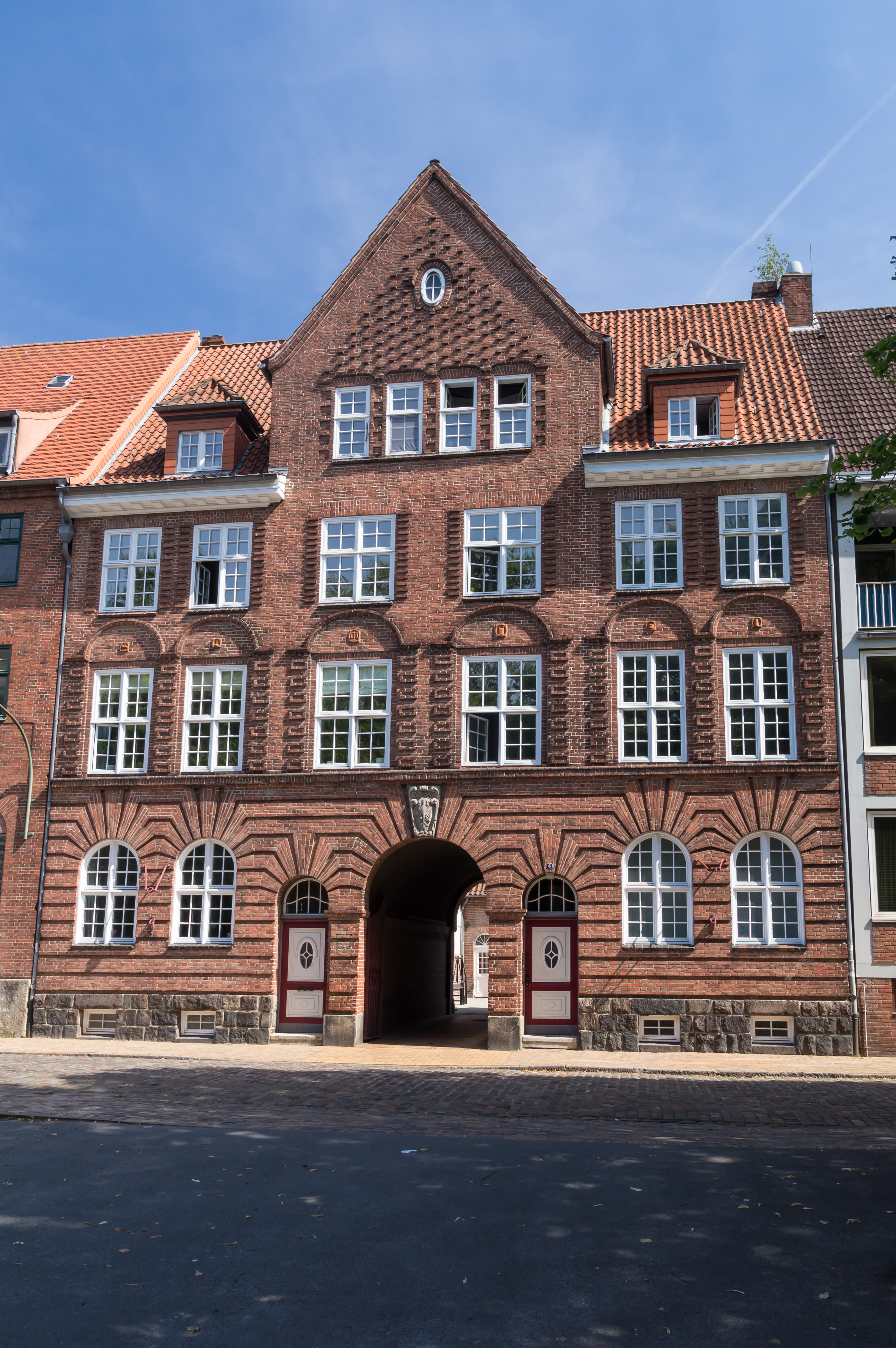 Flensburg-Jürgensby; Karlstraße 6; (Königliches) Eichamt; Denkmal-Nr. 21.